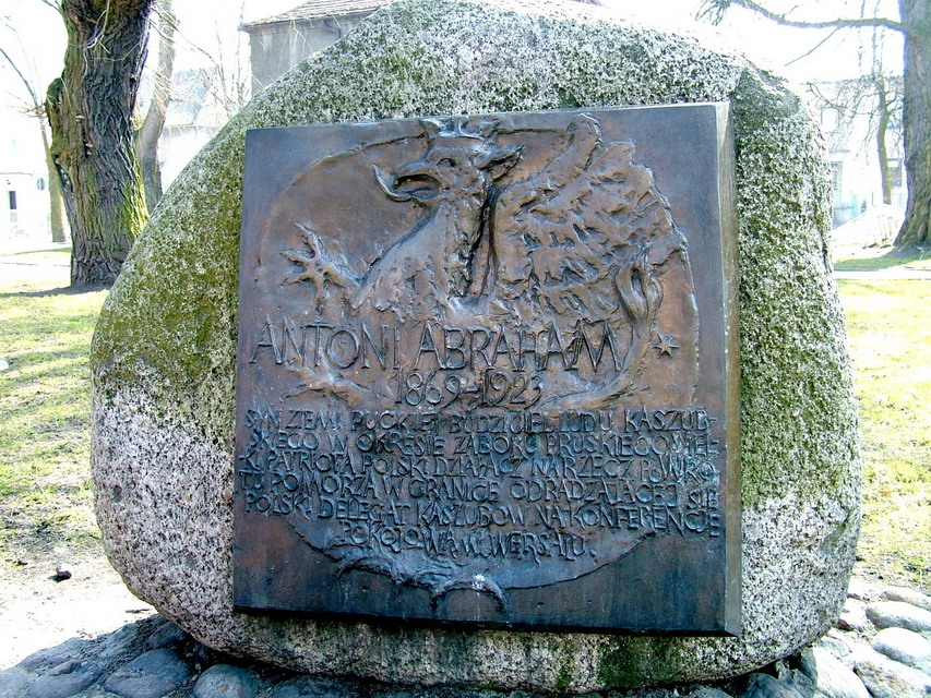 Puck - fragment pomnika Antoniego Abrahama.